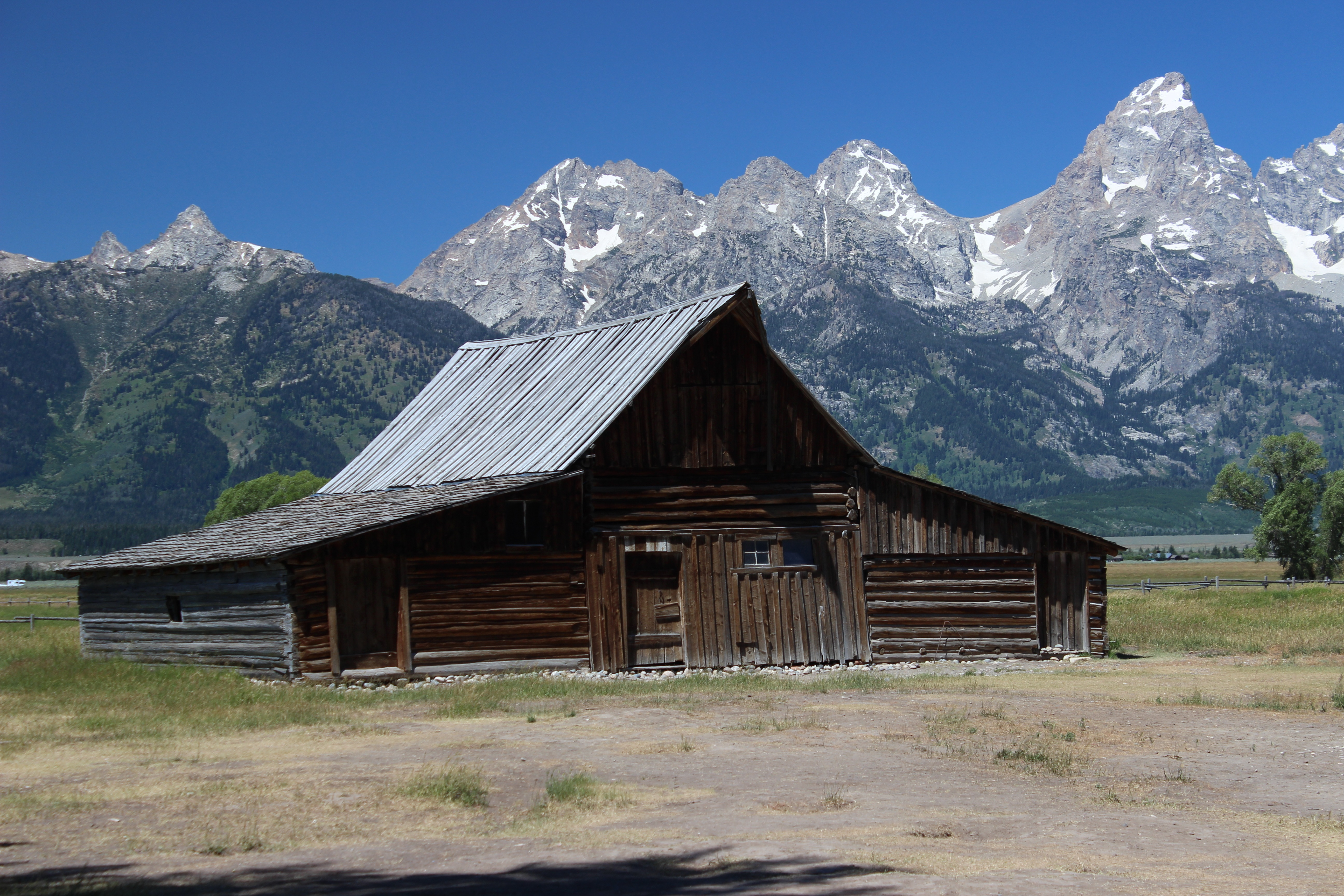 Grand Teton. Mormon Row.